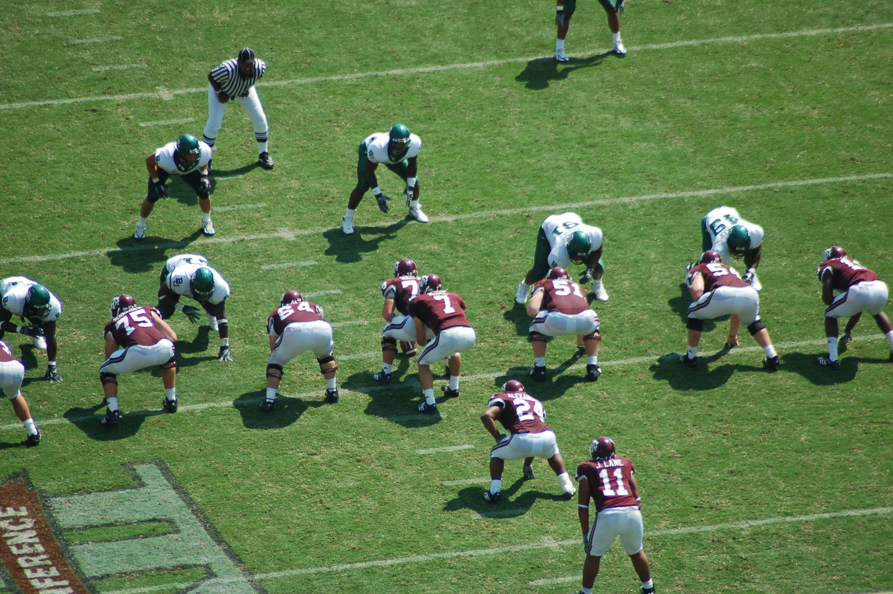 McGee under center